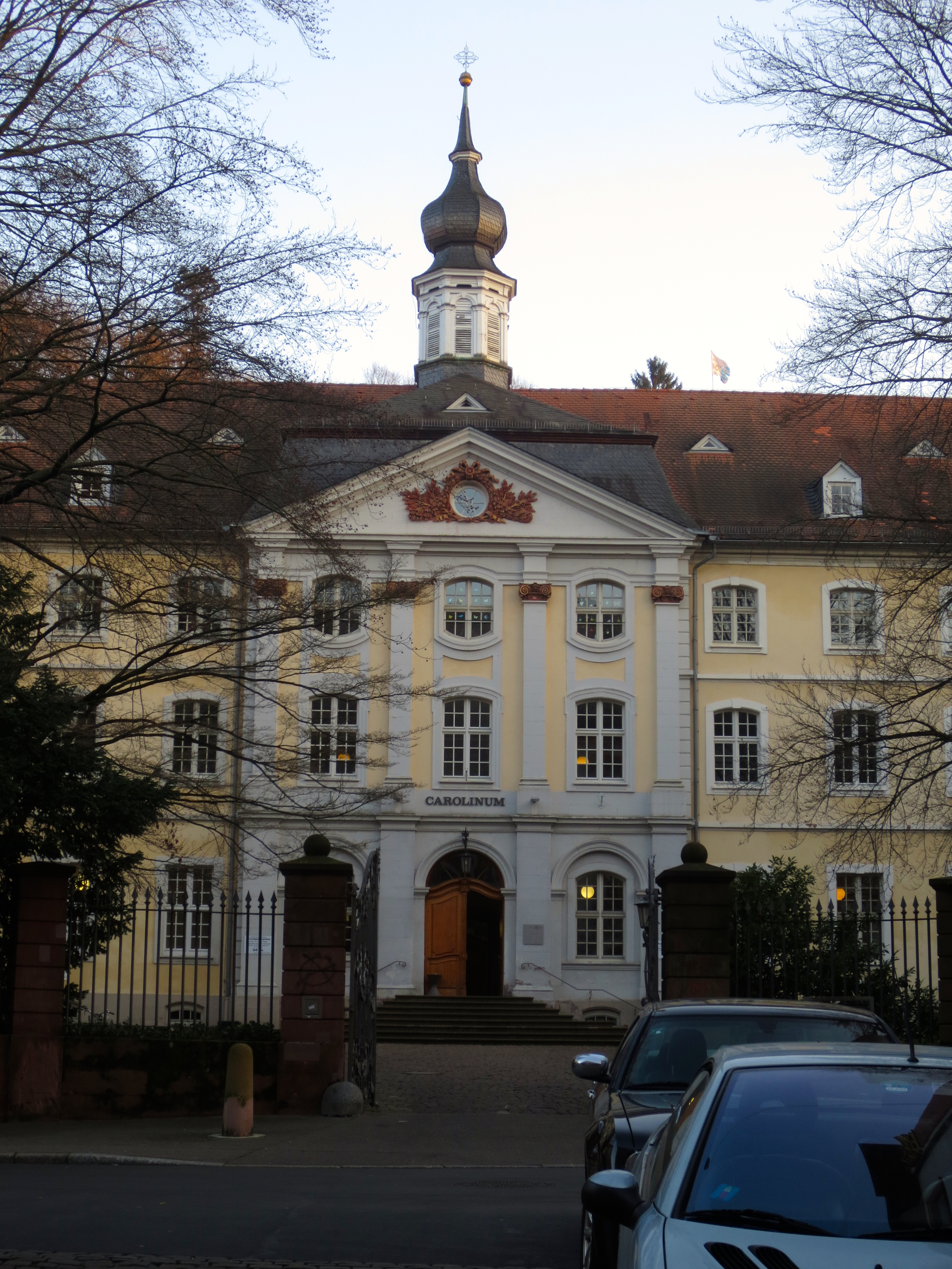 VII. Heidelberg Altstadt Campus Universität Heidelberg Carolinum